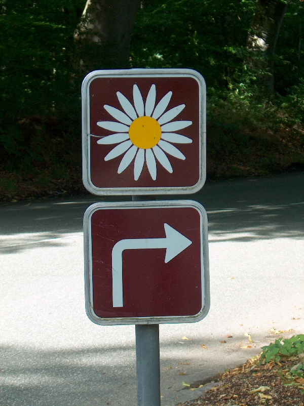 På Margueritruten viser skilte vej rundt på ruten.